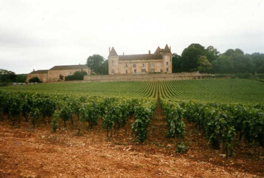 Vignoble de Rully et chateau de Rully